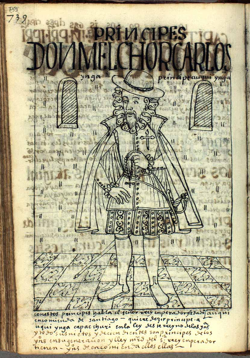 El príncipe Melchor Carlos Inca, hijo de don Carlos Inca, descendiente de los reyes incas.